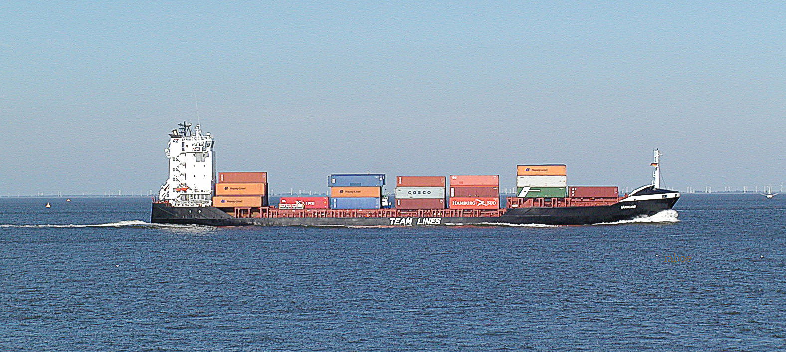 Containerzubringer VÄRMLAND ein "Feederschiff" bei Cuxhaven